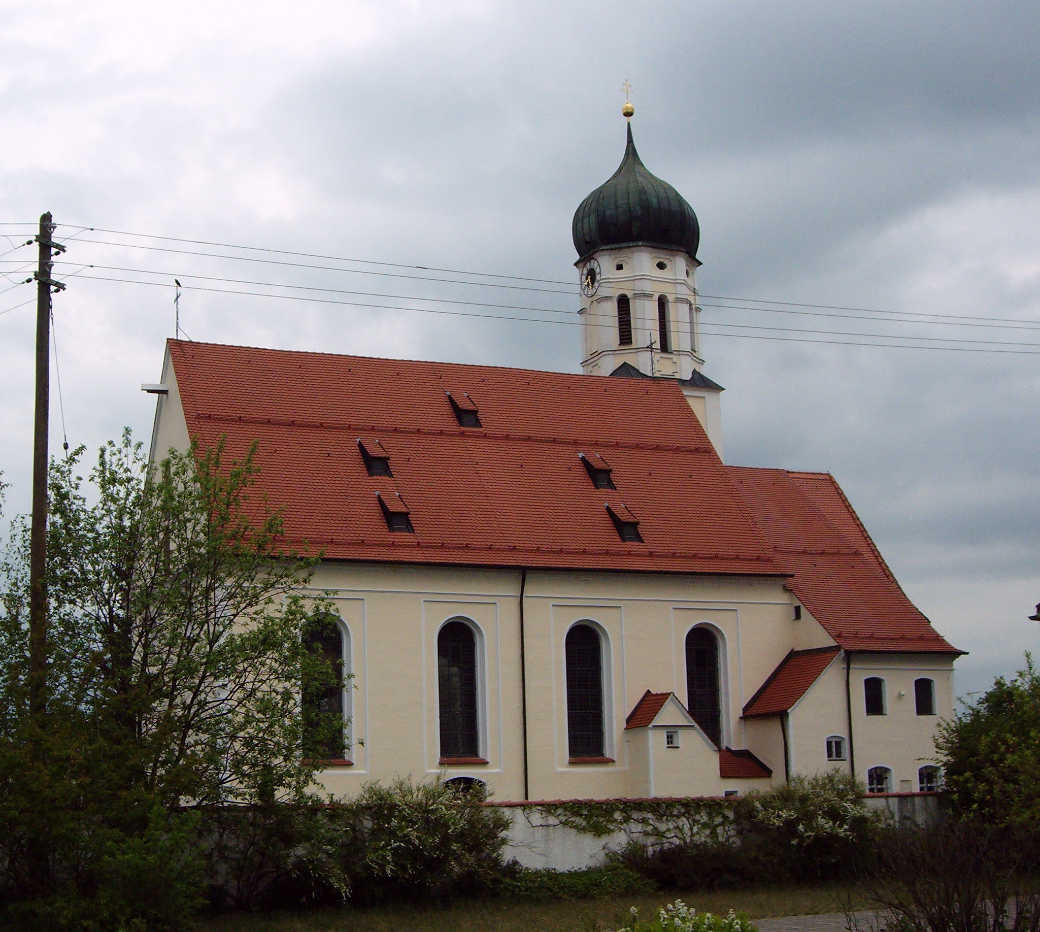 Church in Asch, Germany